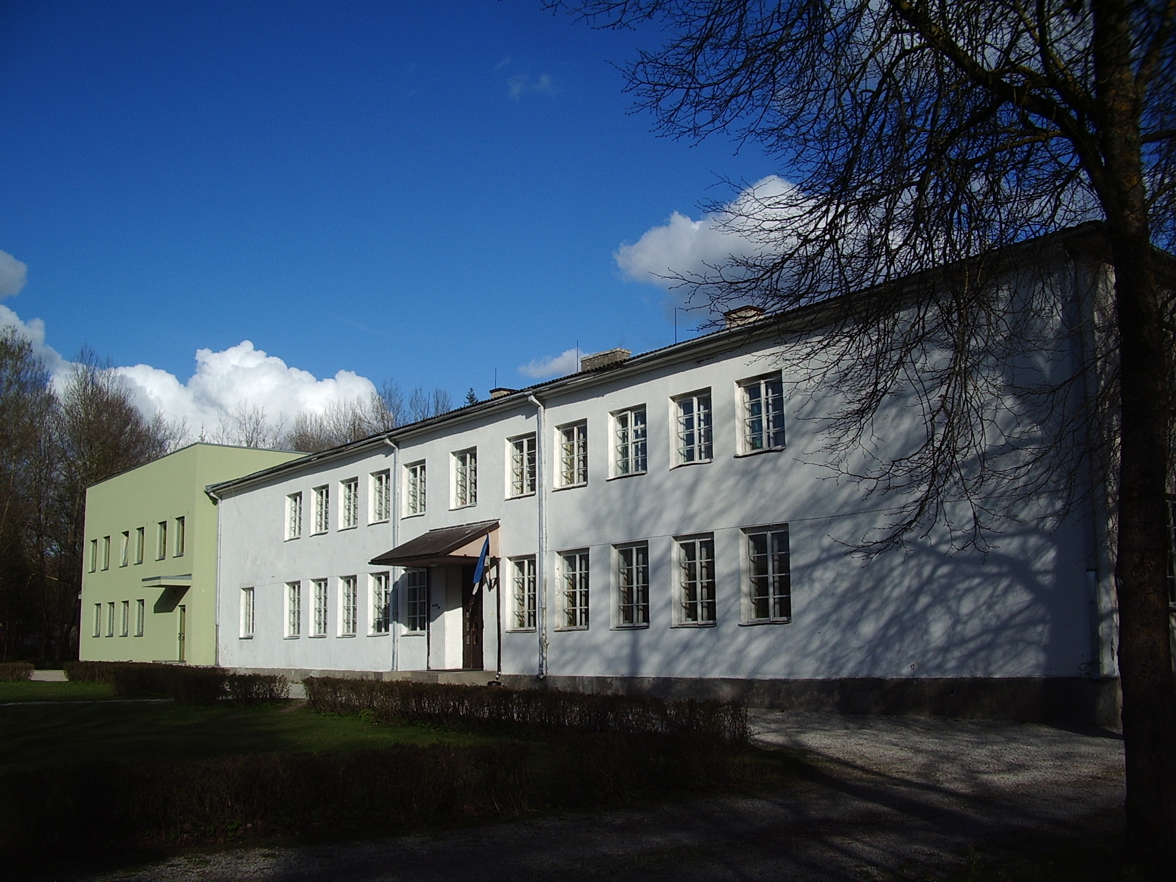 Kallemäe School, Saare County, Valjala parish